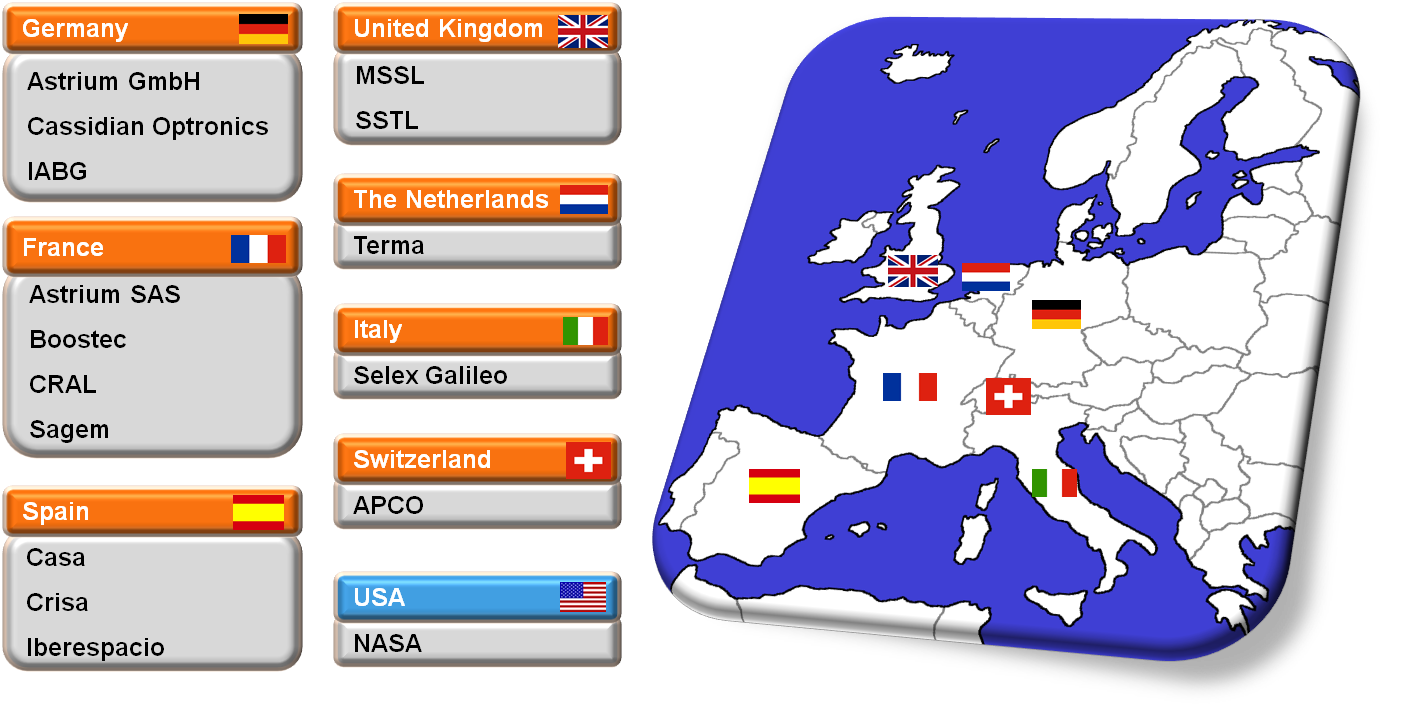 NIRSpec Industrial Partners